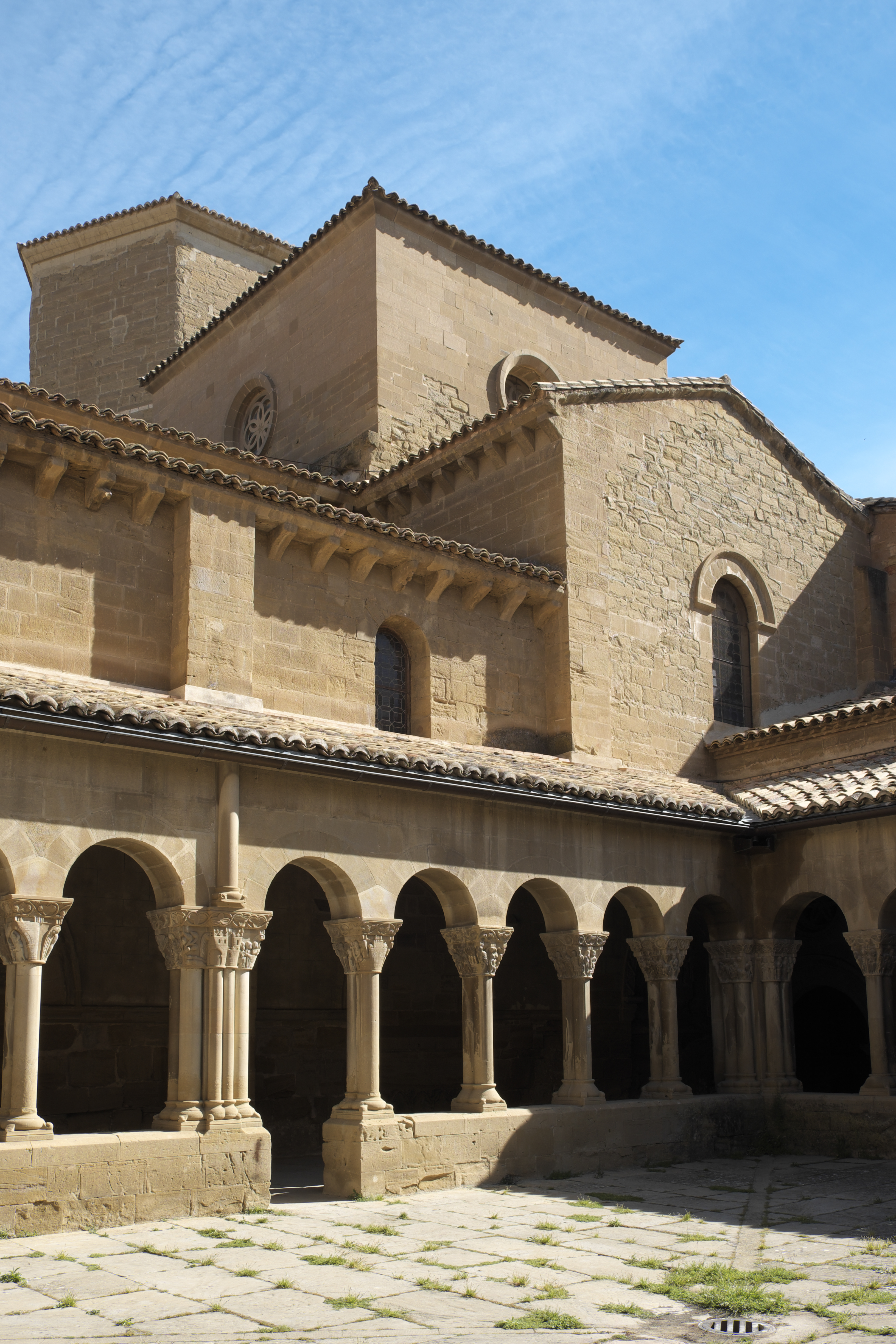 Ehemaliges Benediktinerkloster San Pedro el Viejo in Huesca in der Provinz Huesca (Aragón/Spanien), Kreuzgang